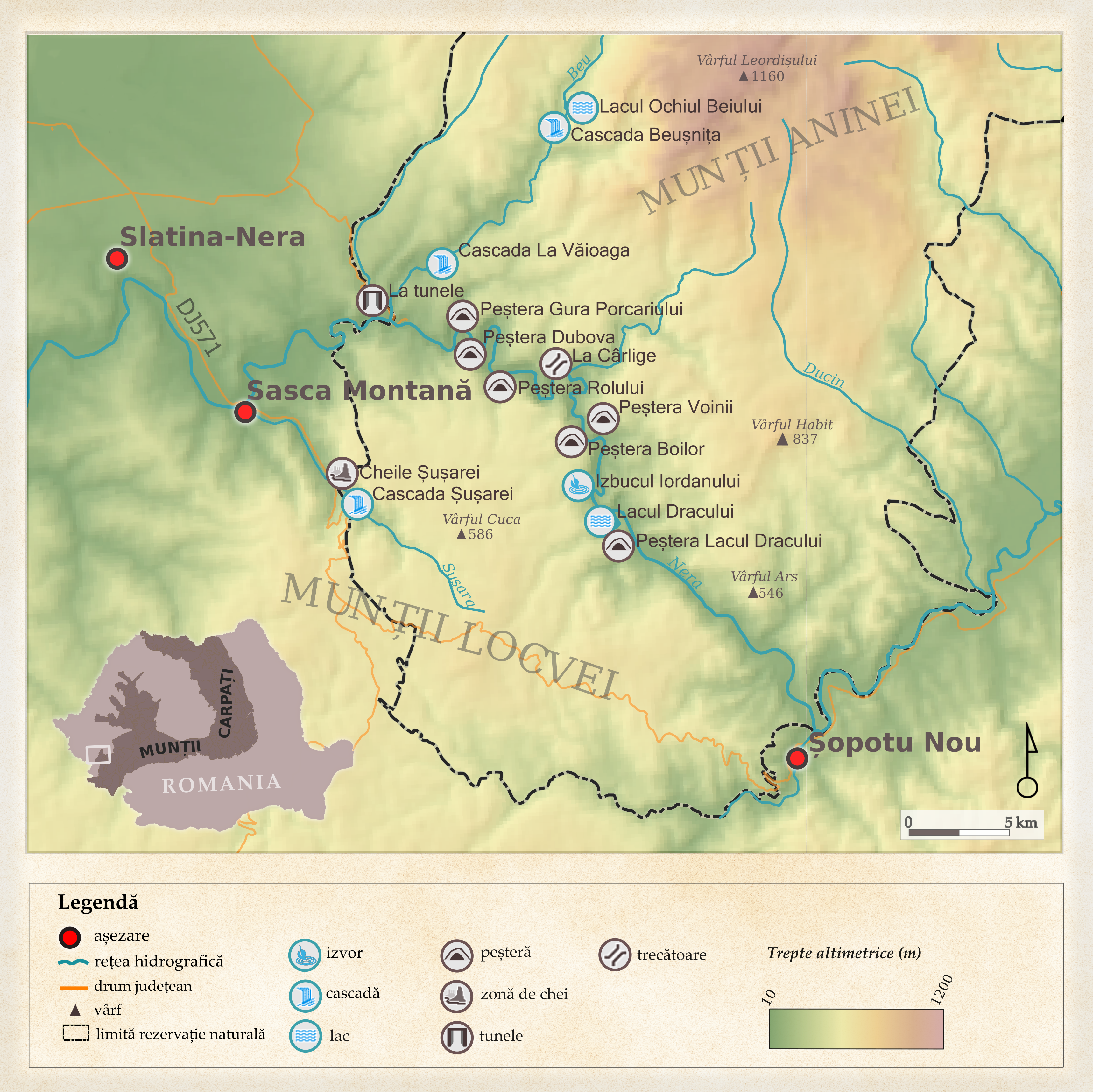 Obiective naturala din zona Cheile Nerei